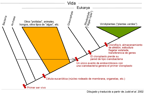 Árbol filogenético de los seres vivos ("árbol de la vida") con especial atención a los eventos que generaron la aparición de las plantas verdes. Dibujado y traducido a partir de Judd et al. 2002.